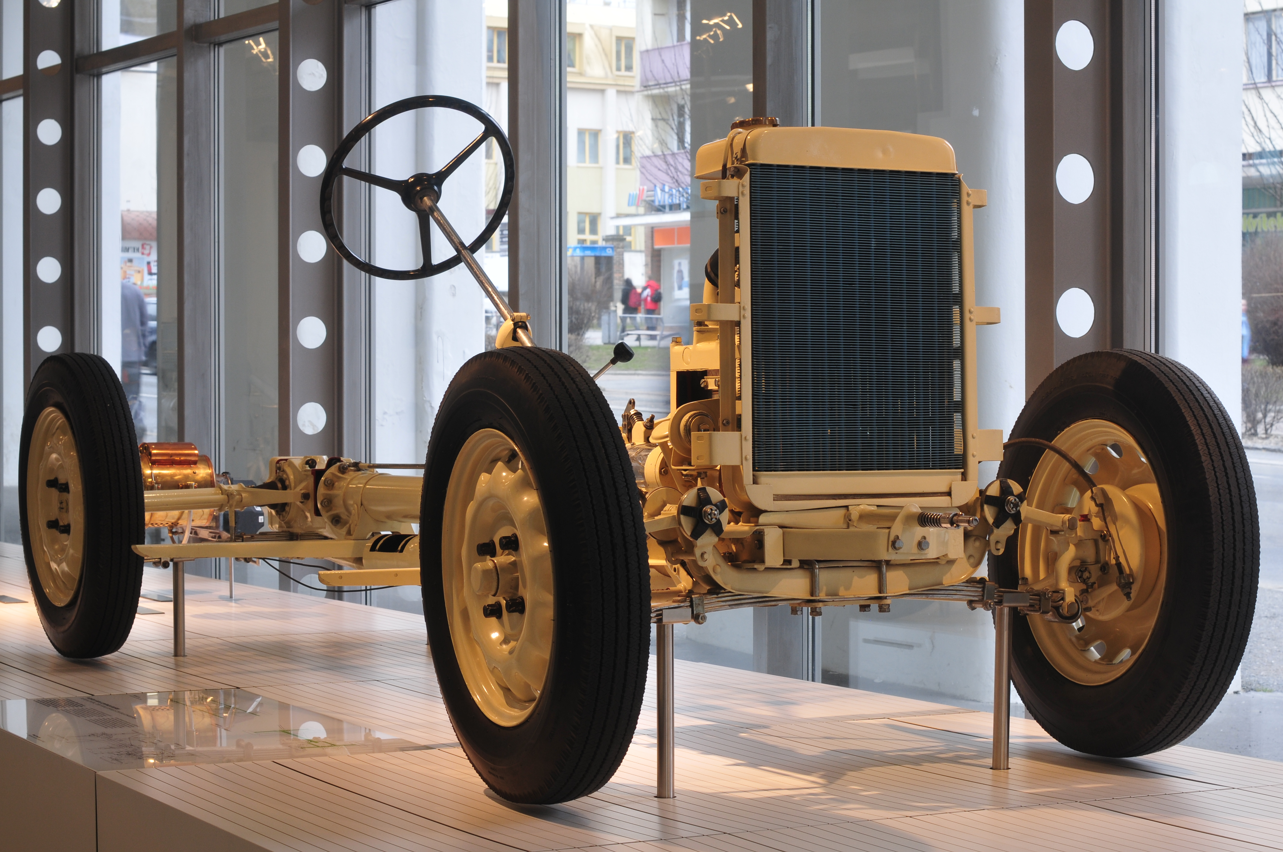 Fototermin Škoda Museum Mladá Boleslav 2013 Fototermin Škoda Muzeum 5. April 2013 in Mladá Boleslav This work is free and may be used by anyone for any purpose. If you wish to use this content, you do not need to request permission as long as you follow any licensing requirements mentioned on this page.